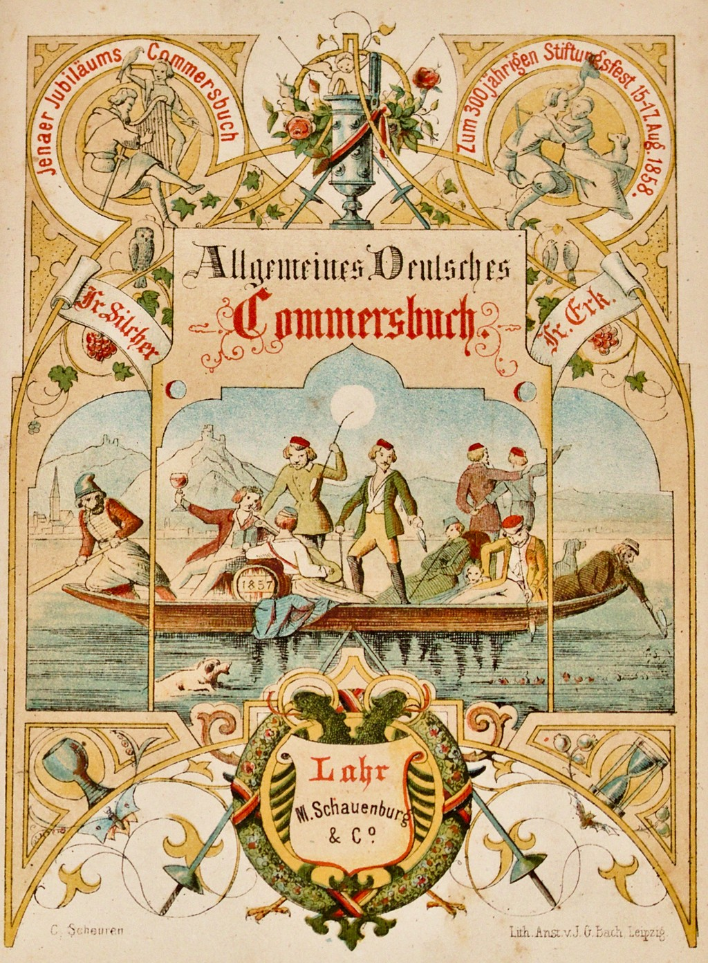 Titelbild des Allgemeinen Deutschen Commersbuches 11. Auflage (ca. 1867)